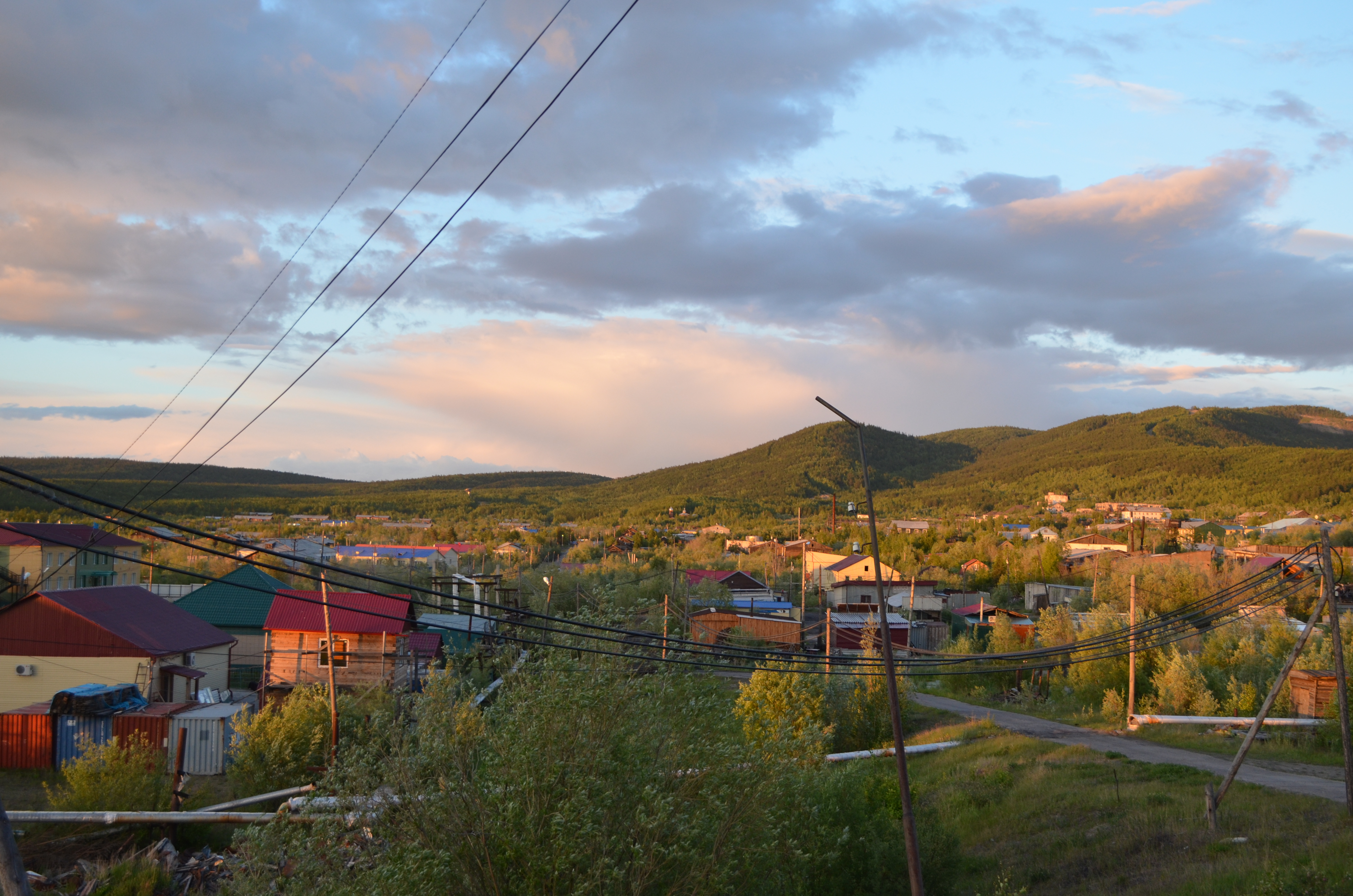 Поездка в Сангар 19-20.06.2016 на теплоходе Ракета-269